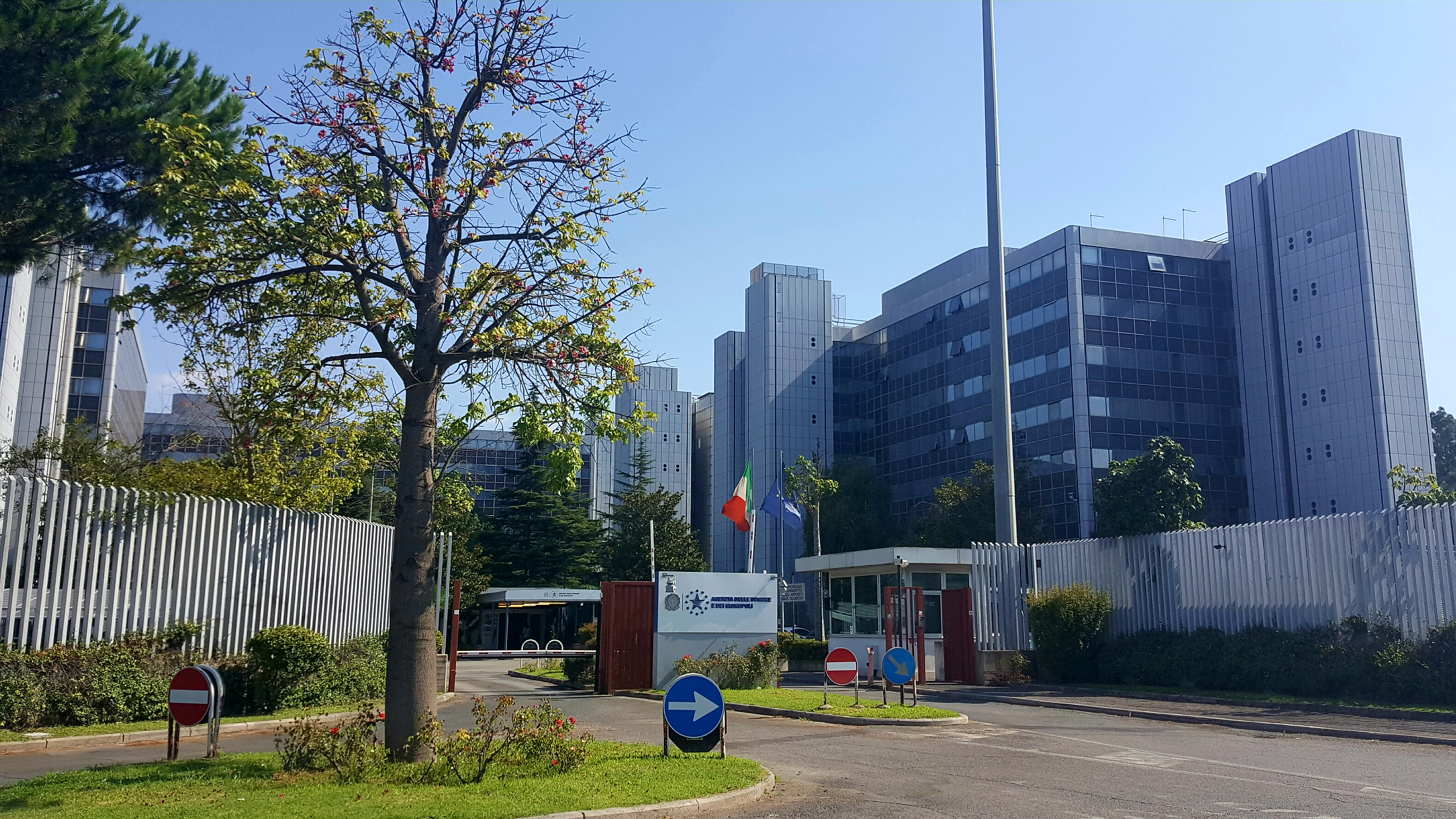 Sede dell'Agenzia delle Dogane e dei Monopoli a Roma, Via Mario Carucci, 71